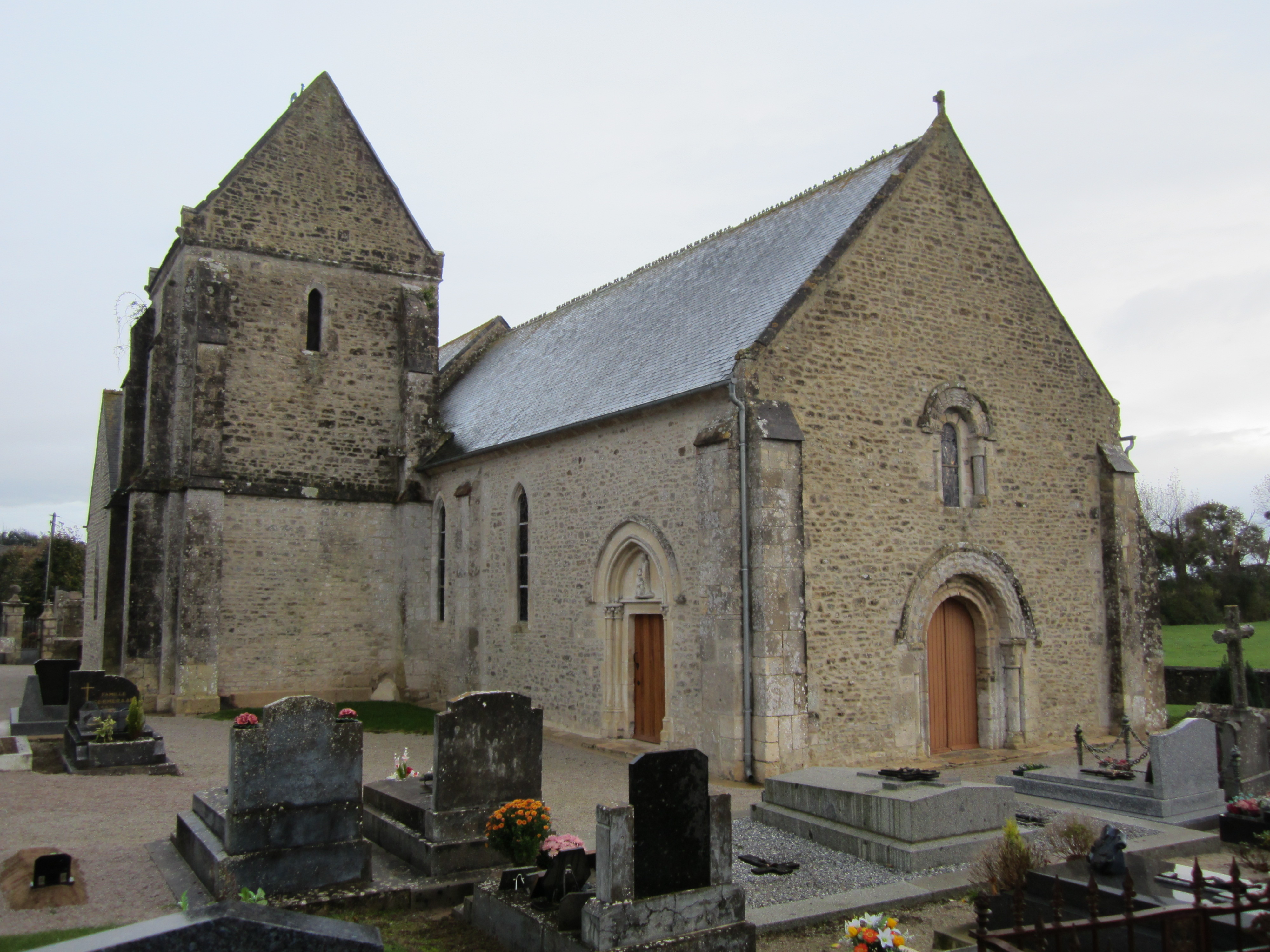 Église Saint-Pierre du Le Ham (Manche)